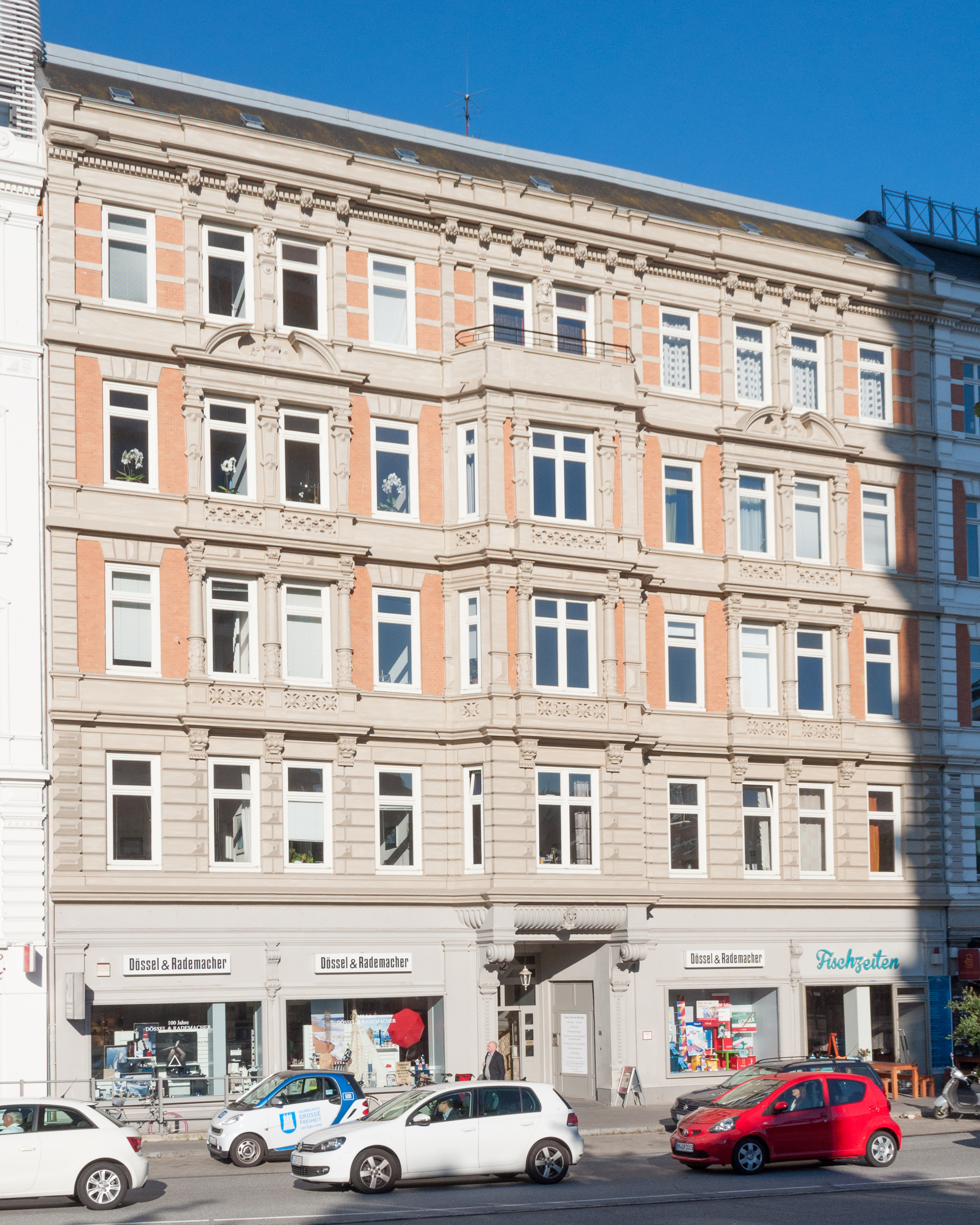 Wohngeschäftshaus Brandstwiete 42 in Hamburg-Altstadt. This is a photograph of an architectural monument.